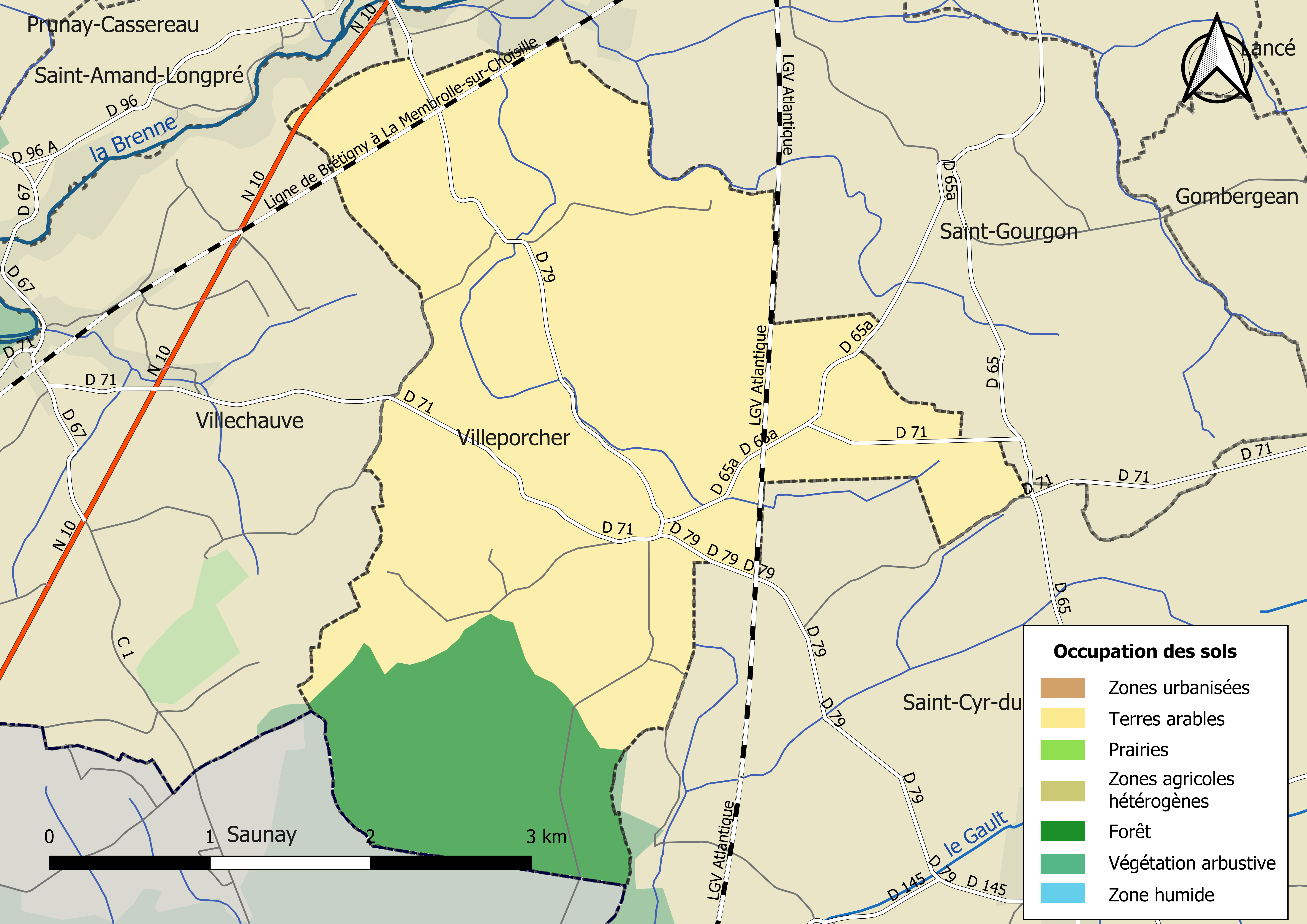 Carte des infrastructures et de l’occupation des sols en 2018 de la commune de Villeporcher (France).